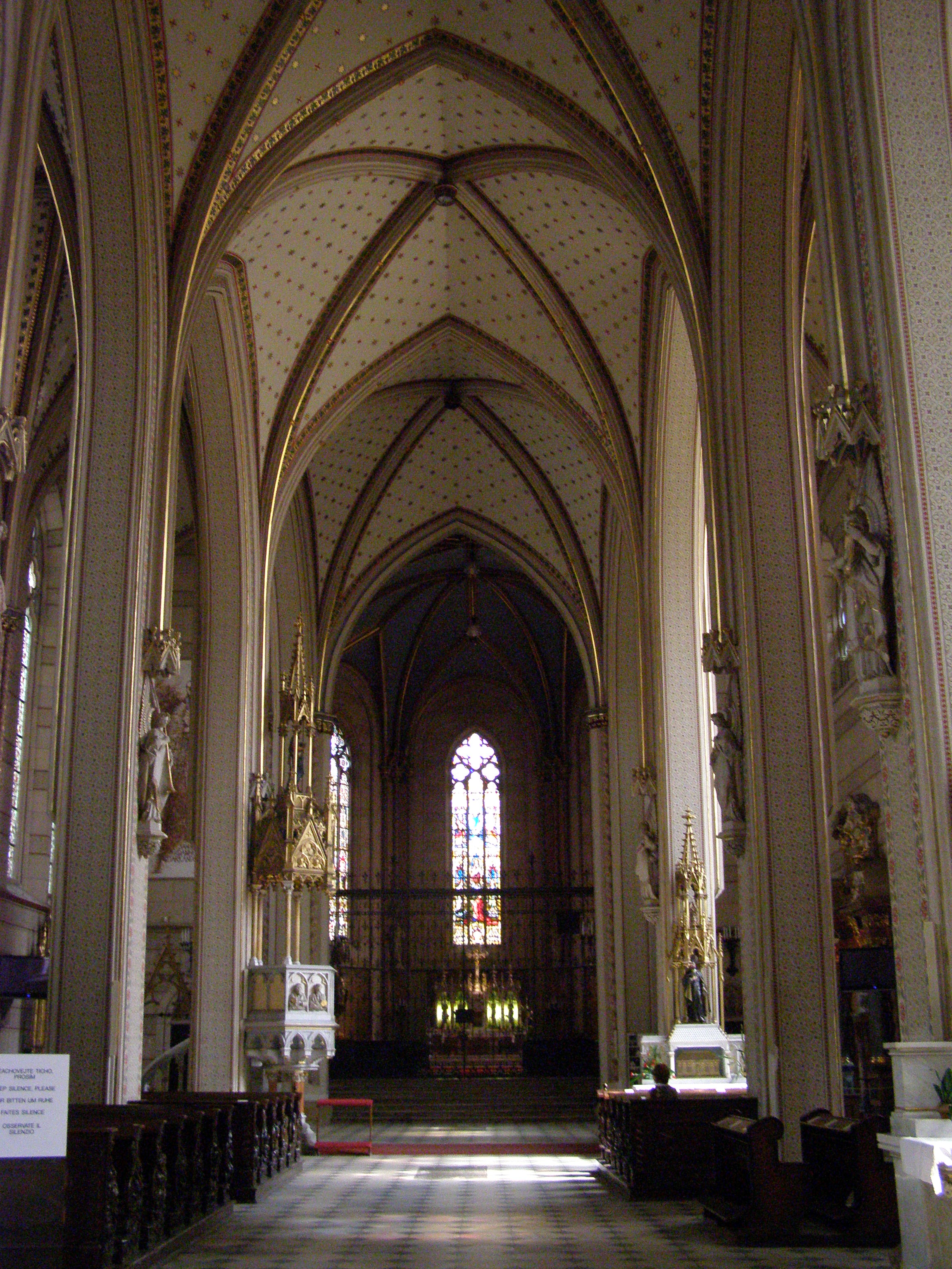 Dóm svatého Václava v Olomouci, interiér.